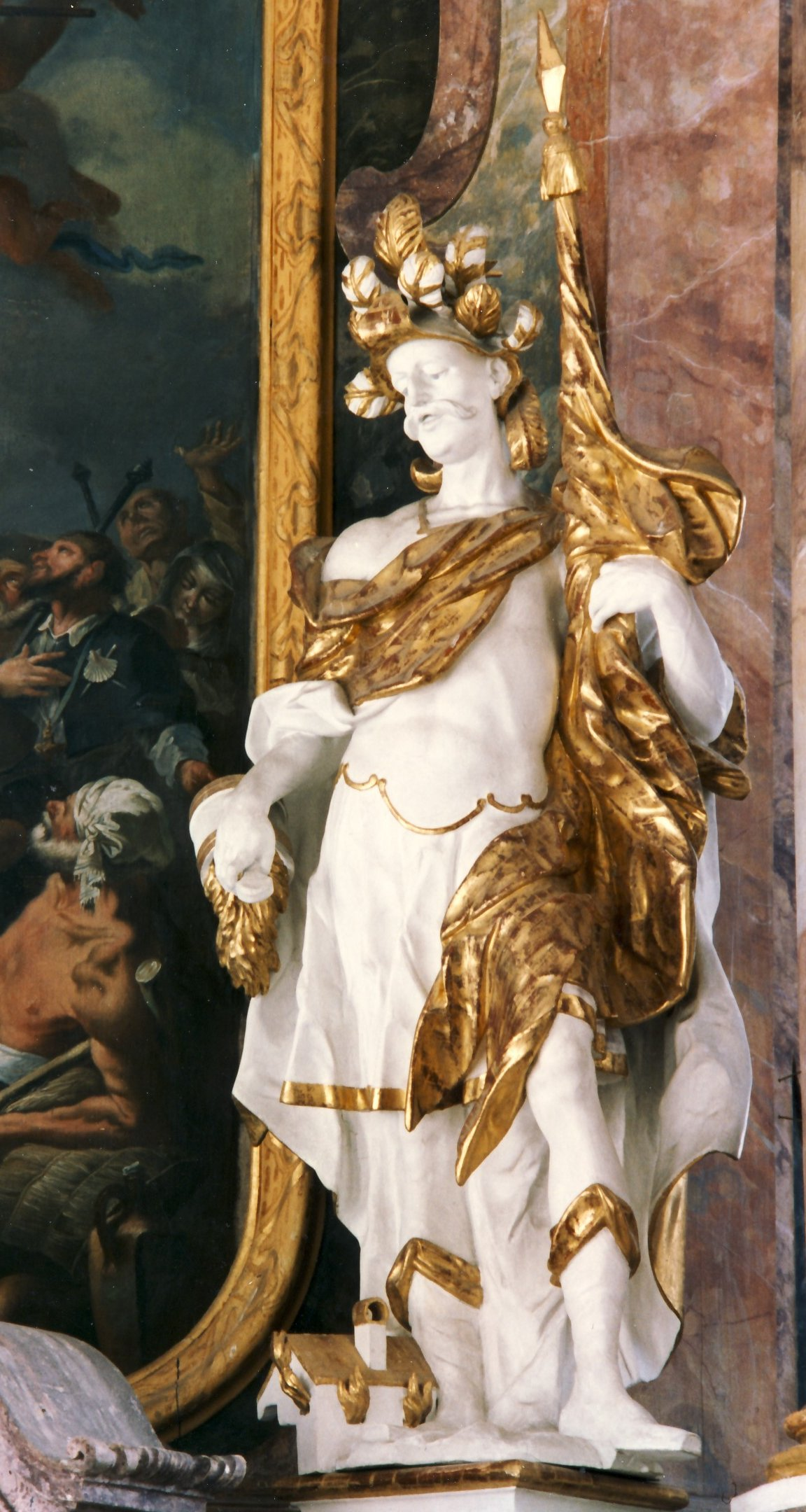 Hl. Florian von Maximilian Hitzelberger in der Kirche St. Georg auf dem Auerberg/Bernbeuren